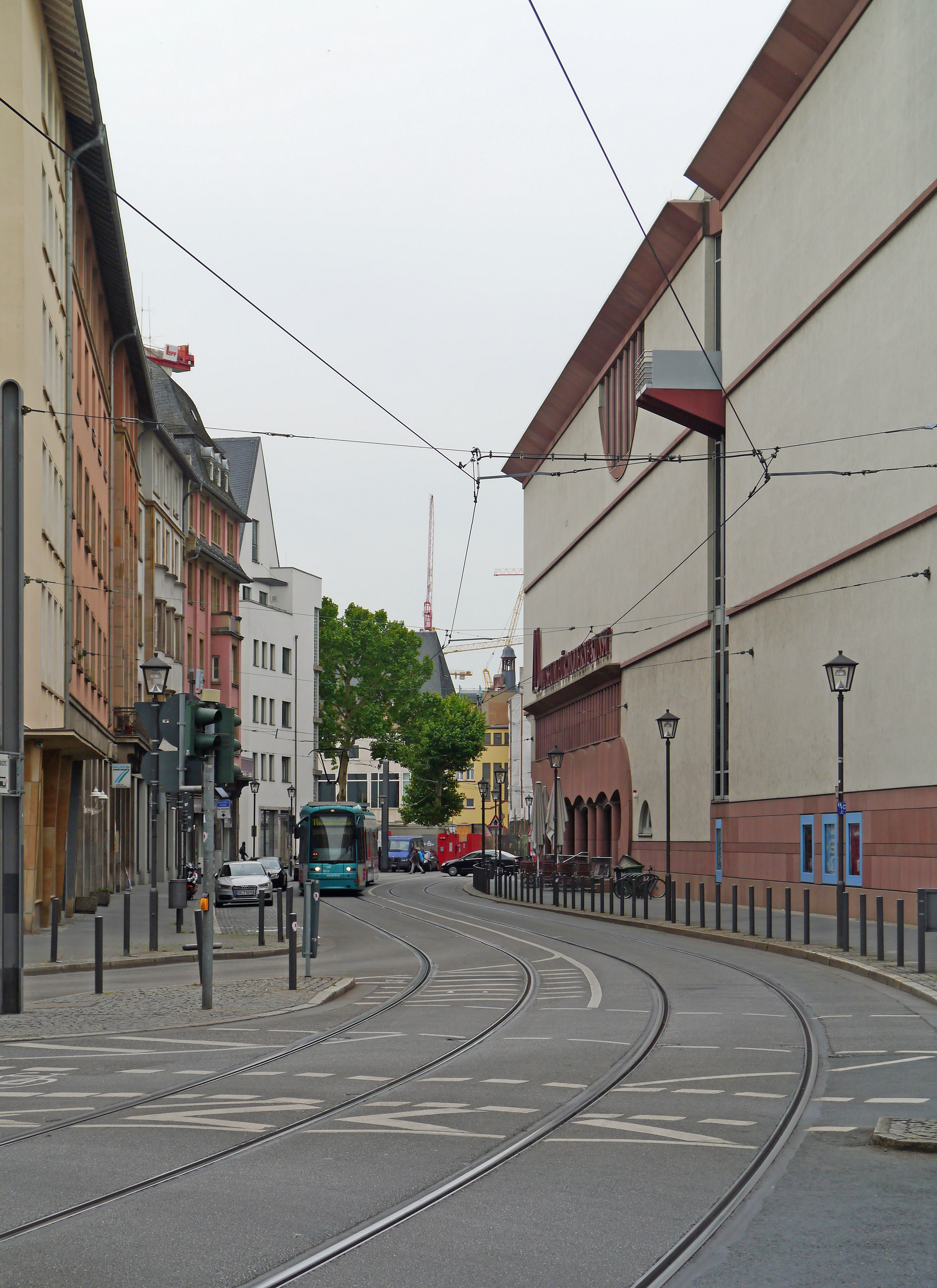 Anfang der Braubachstrasse in Frankfurt am Main - Altstadt am MMK. Ansicht von der Fahrgasse.